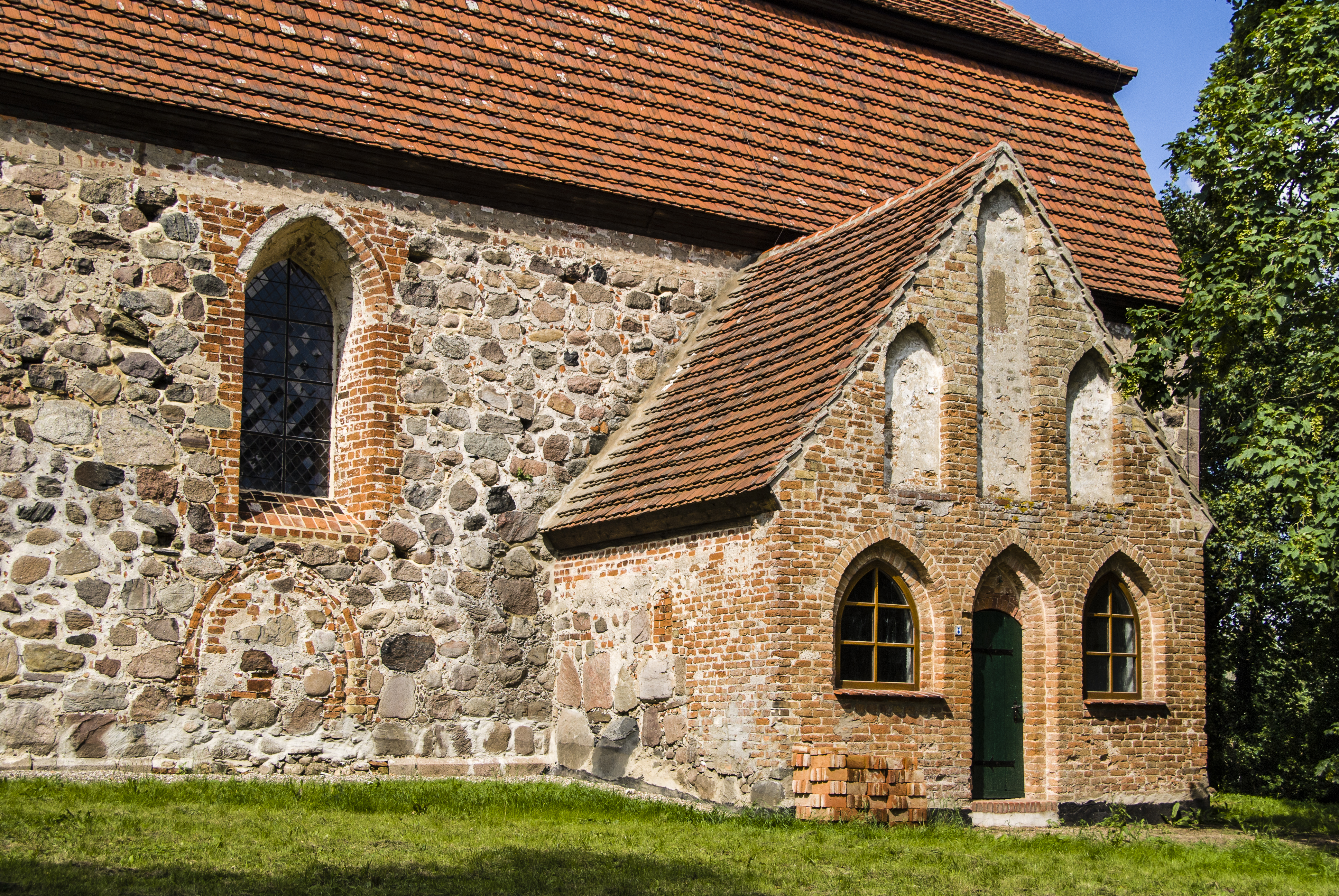 Dorfkirche Moisall - Nordansicht